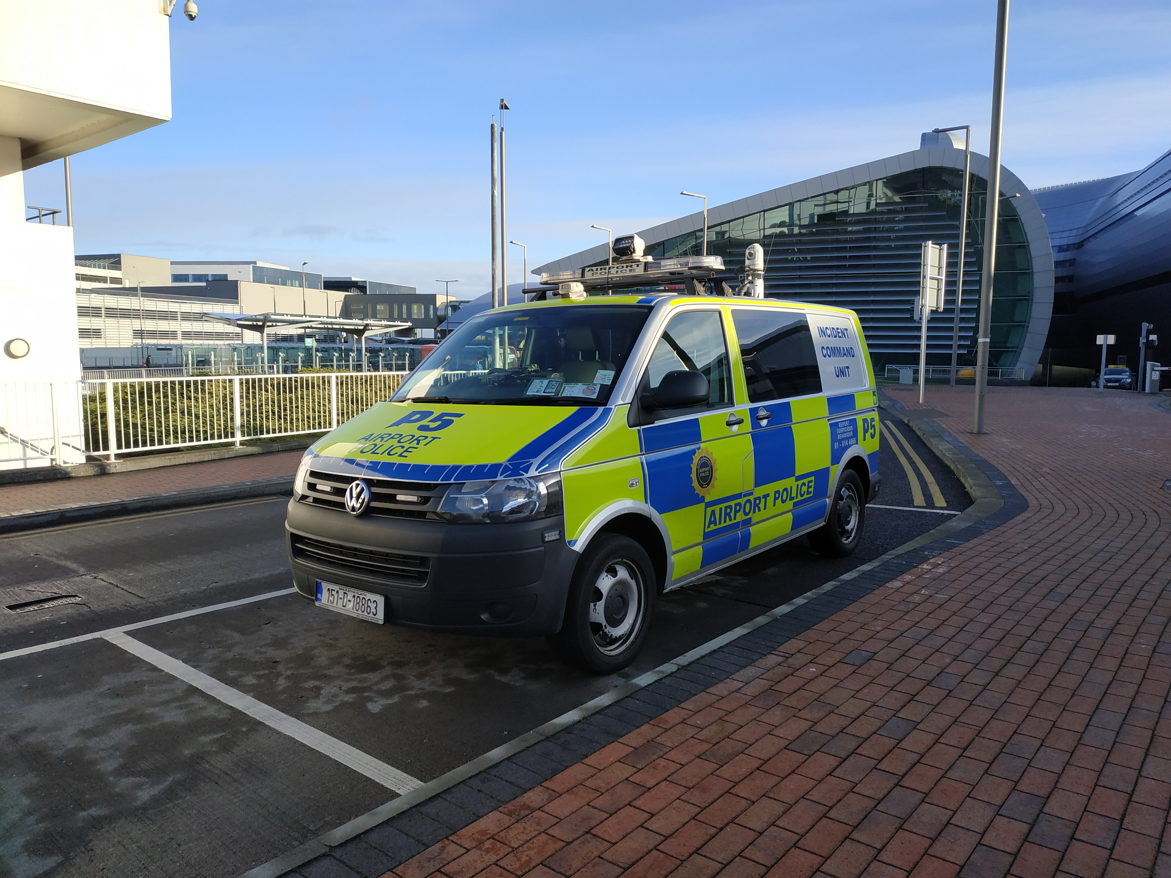 Véhicules de la police aéroportuaire de Dublin